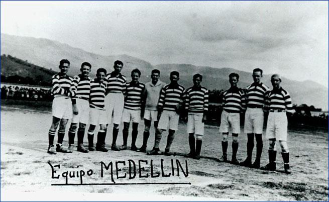 Independiente Medellín en 1928. • De izquierda a derecha, Ignacio Arriola D., Iván Robledo, Silvio Robledo, Hernando Faciolince, Jesús Arriola D., Carlos Congote, Cipriano Torres, Gonzalo Londoño, Leonardo Arango, Pedro Justo Berrío y Pedro Arango M. Fecha de la toma: 05/08/28